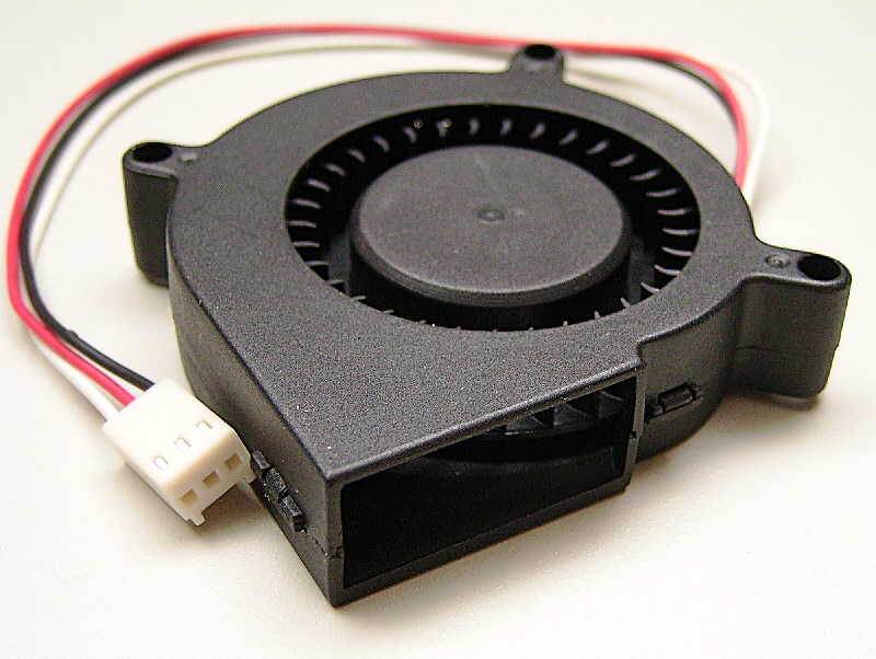 Radiallüfter für einen Prozessorkühler